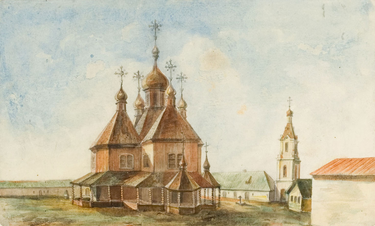 Беларуская (тарашкевіца): Віцебск (Viciebsk), Маркаўшчына (Markaŭščyna). Траецкі Маркаў манастыр